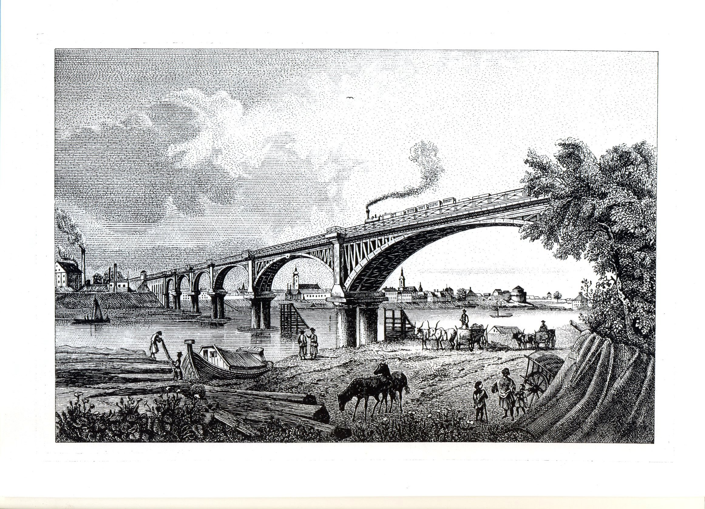 Szegedi vasúti híd, lebombázva 1944-ben (Somorjai Ferenc grafikája)